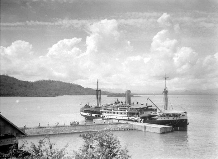 Repronegatief. Haven van Merak, Sumatra